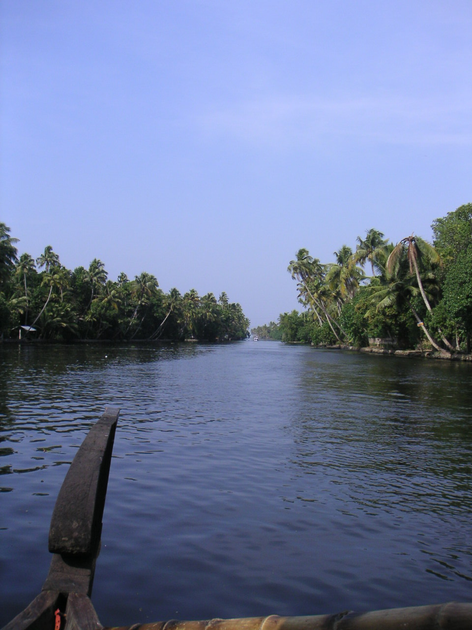 Kerala Backwaters. Photo: Soman